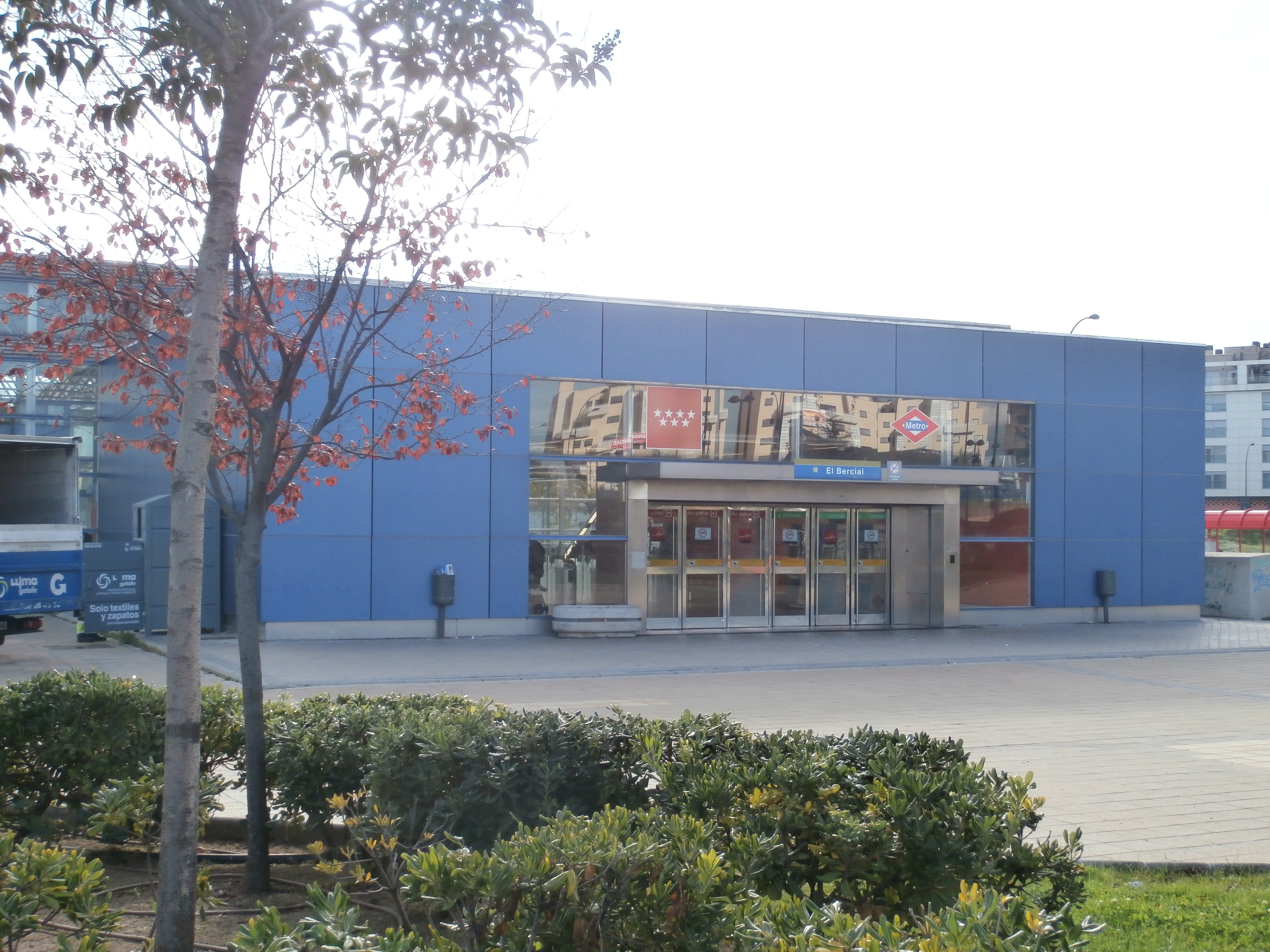 Entrada de la estación de El Bercial en Getafe.